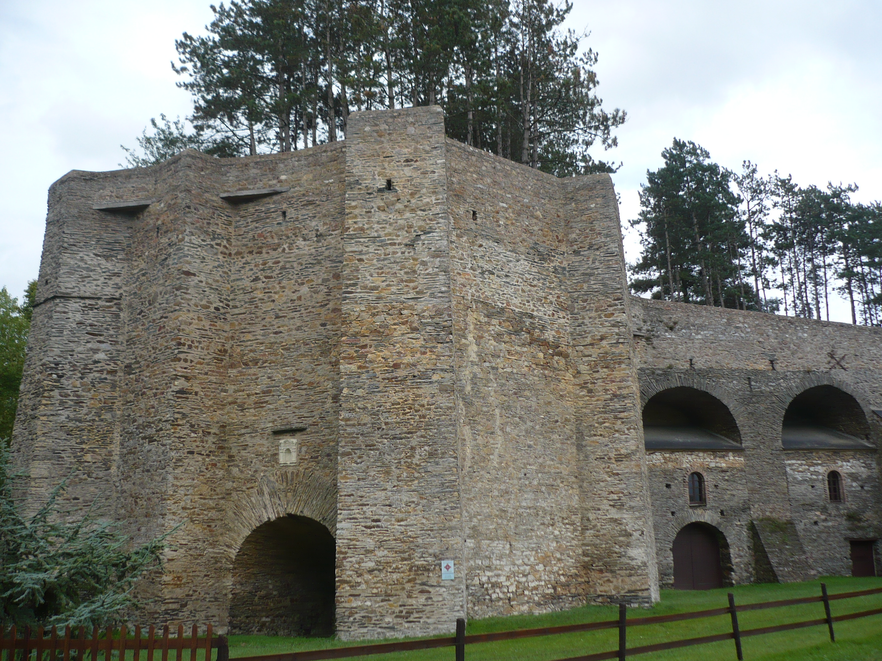 Angrie - Fours à chaux de la Veurière